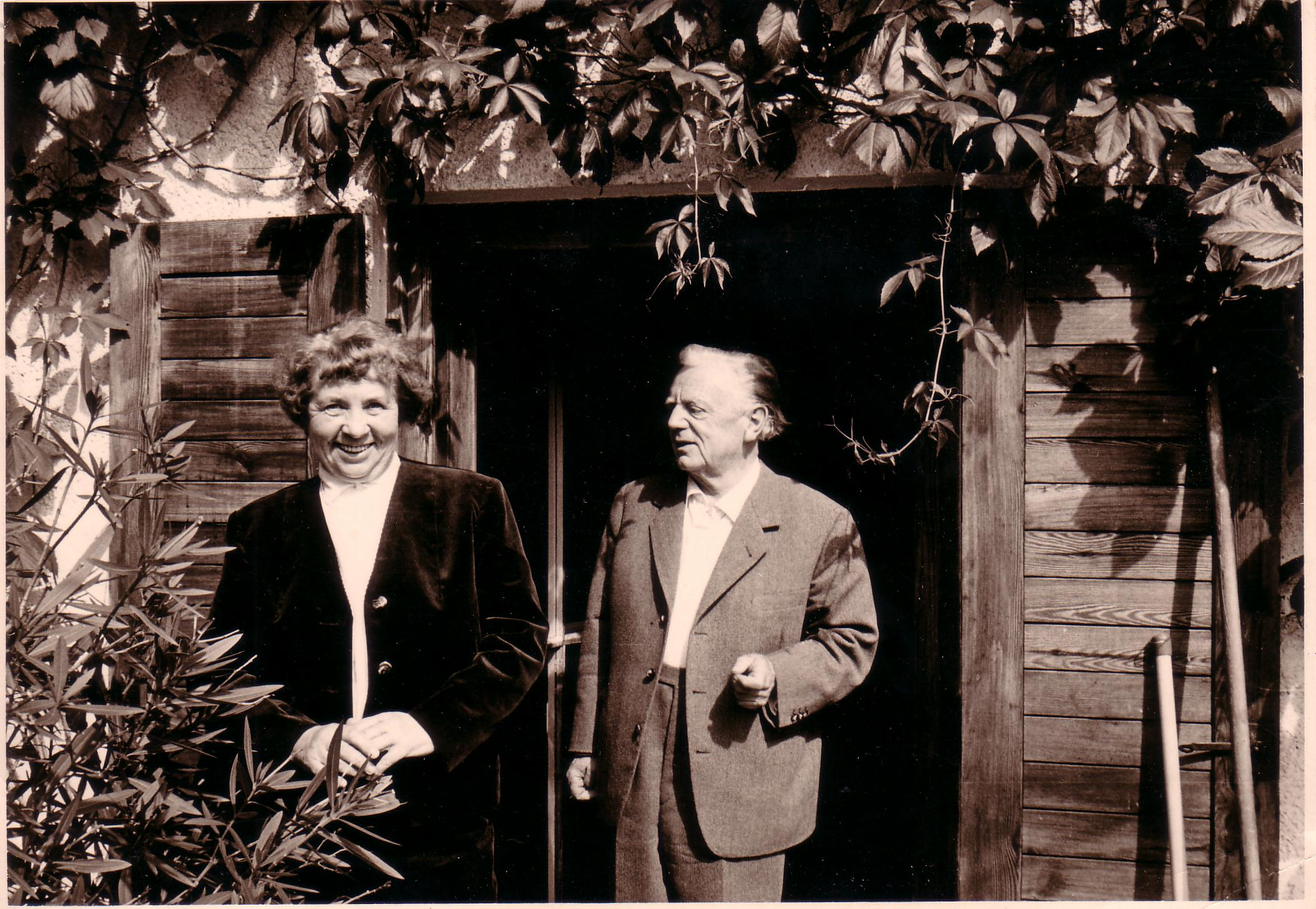 Philipp Harth und seine Ehefrau Ida Harth-zur Nieden auf der Terrasse ihres Hauses in Bayrischzell 1962.